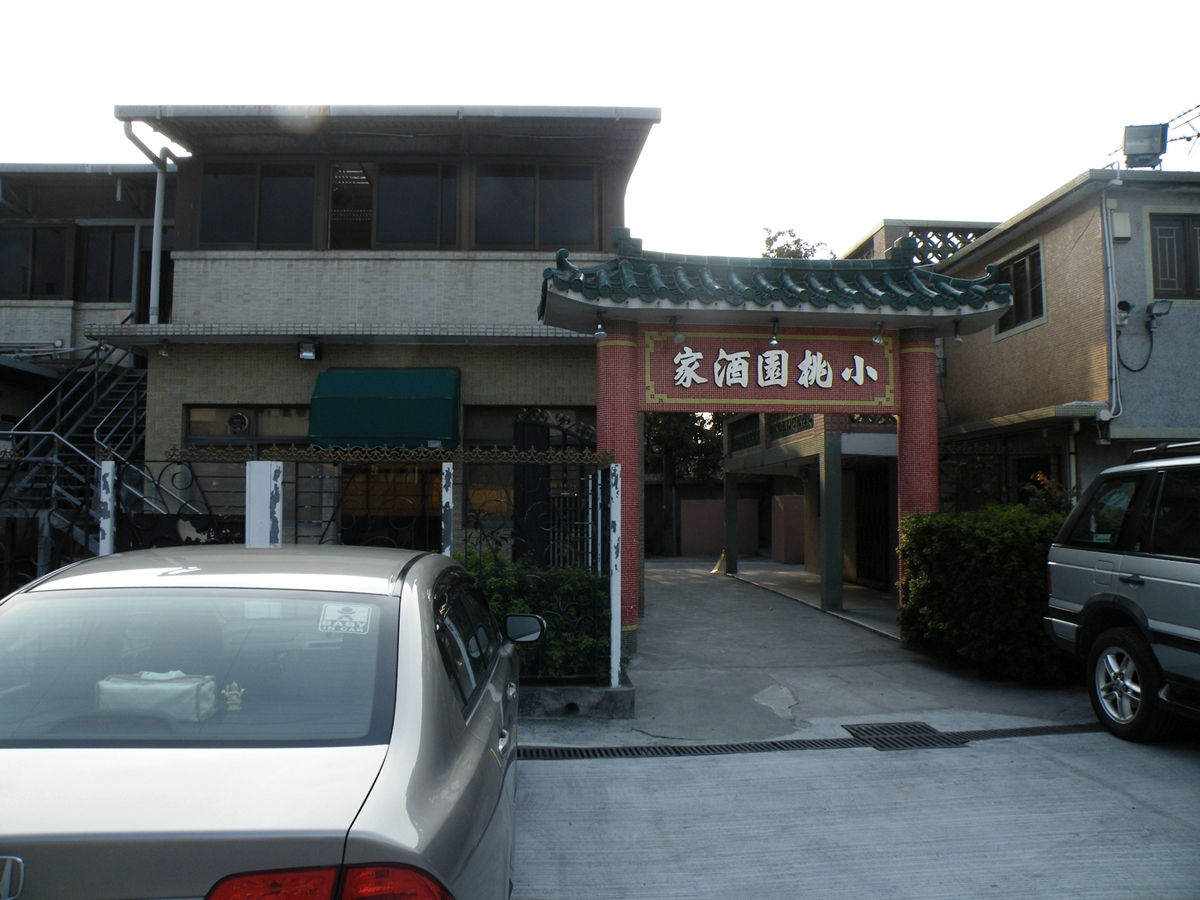 Siu Tao Yuen Restaurant, Lau Fau Shan